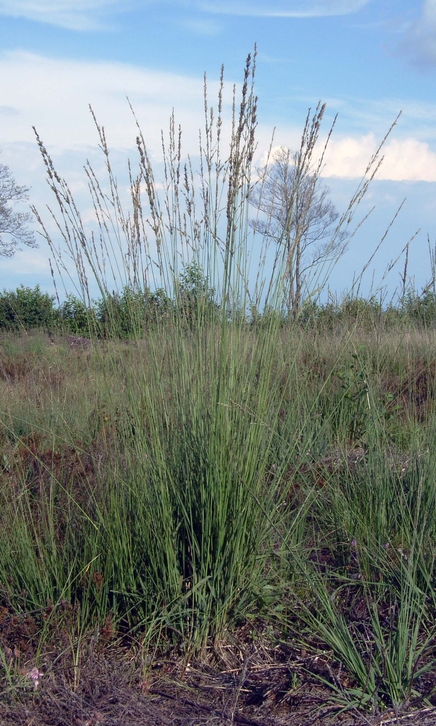 Blaues Pfeifengras (Molinia caerulea), Höhe ca. 1,20 Meter, Moorstandort, Nordwestdeutschland